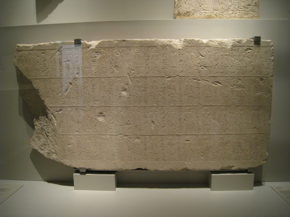 Stèle de la généalogie d'Ankhefensekhmet - XXIIe dynastie égyptienne